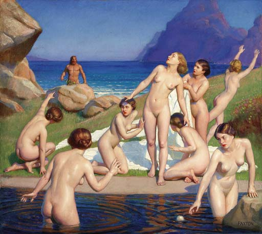 Nausicaa